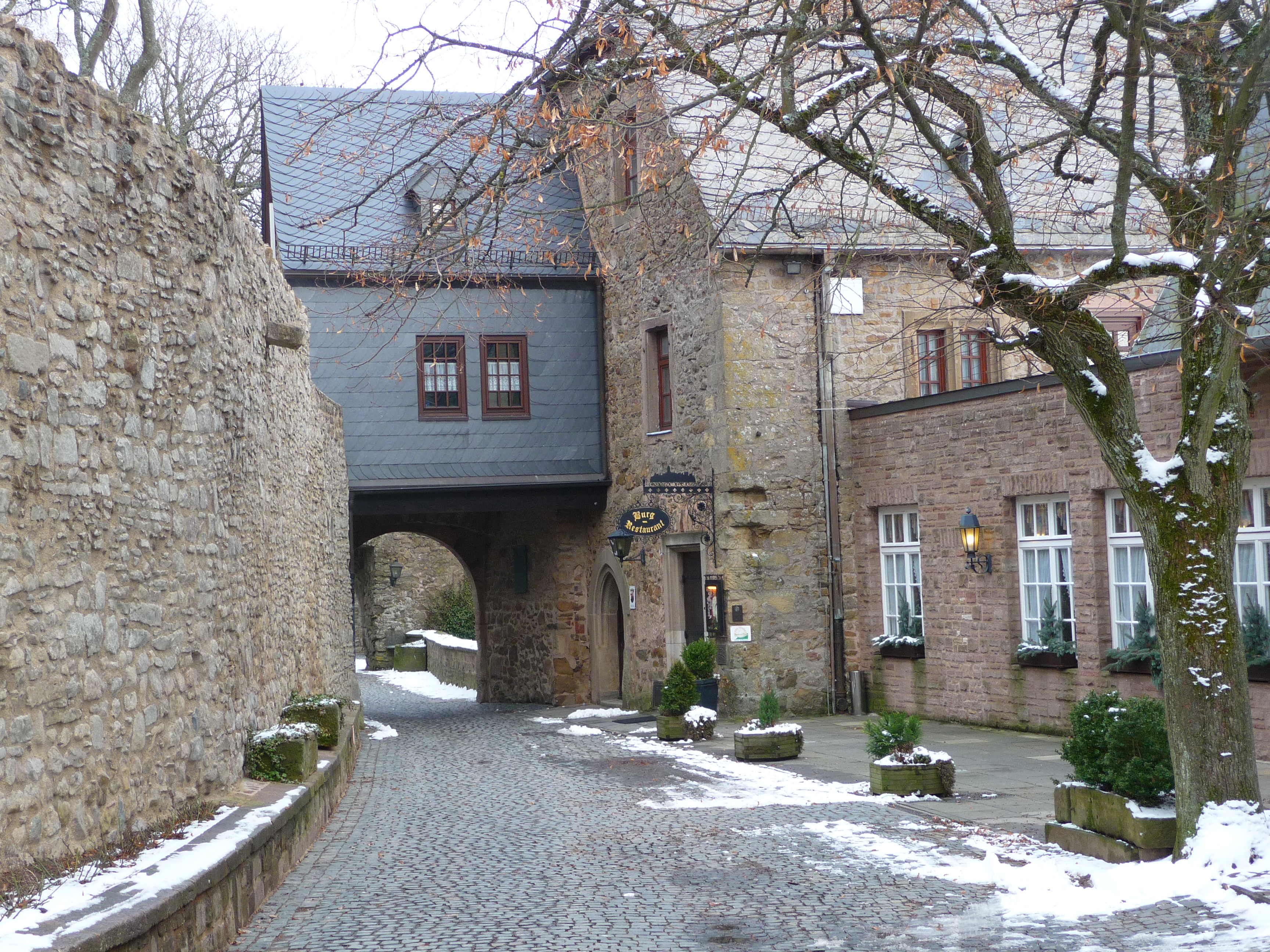 Burg Lichtenberg: Blick auf drittes Tor und das Burgrestaurant (Landkreis Kusel, Rheinland-Pfalz, Deutschland)